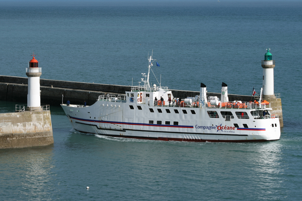 Le Palais arrivee du bateau